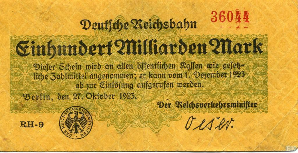 100 миллиардов немецких марок. Германия. Октябрь 1923, аверс. Односторонняя купюра.